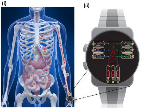 داروی شیمی درمانی، از دستگاه نصب شده در مچ به سمت روده حرکت و به سلول های سرطانی برخورد می کند.